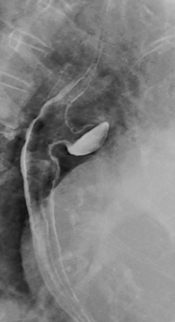 Pulsionsdivertikel des mittleren Ösophagus. Im Gegensatz zu Traktionsdivertikeln ist die Kontur gerundet und nicht zipflig.